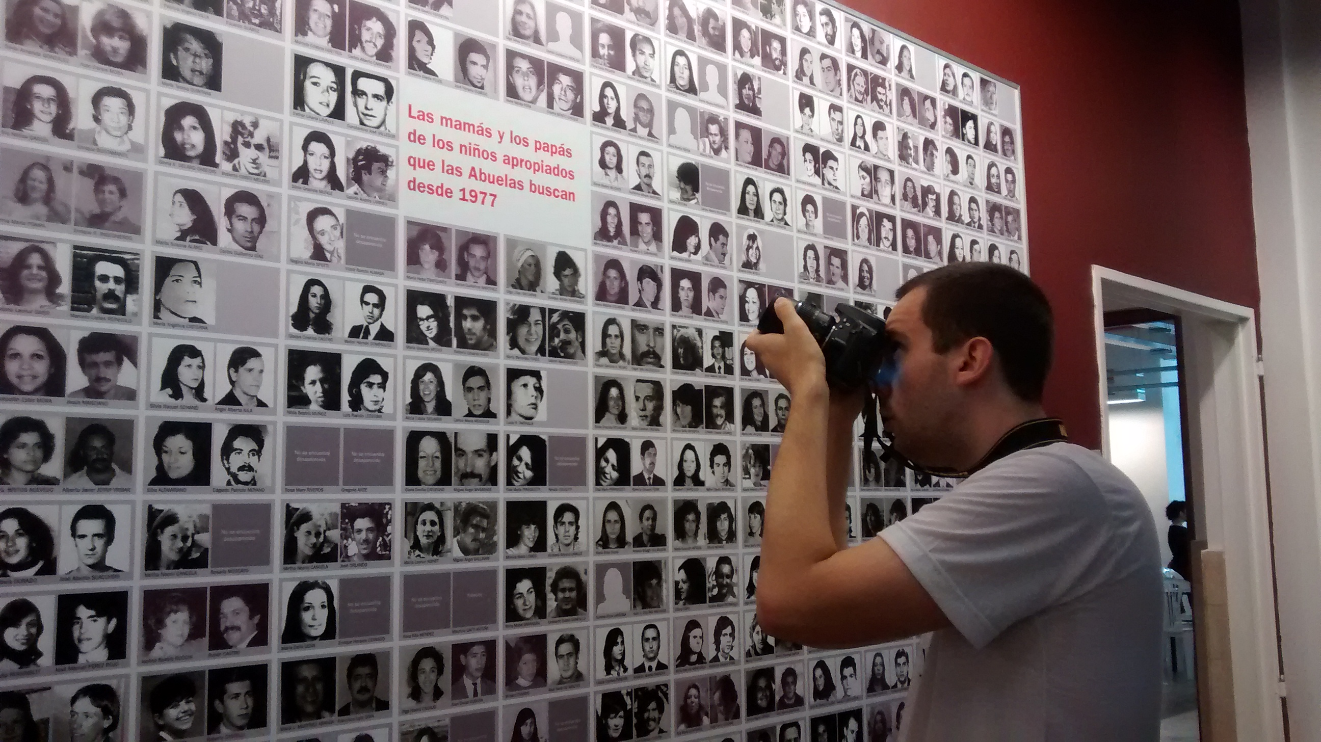 Editatón Abuelas de Plaza de Mayo